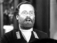 кадр из фильма "Депутат Балтики" 1936